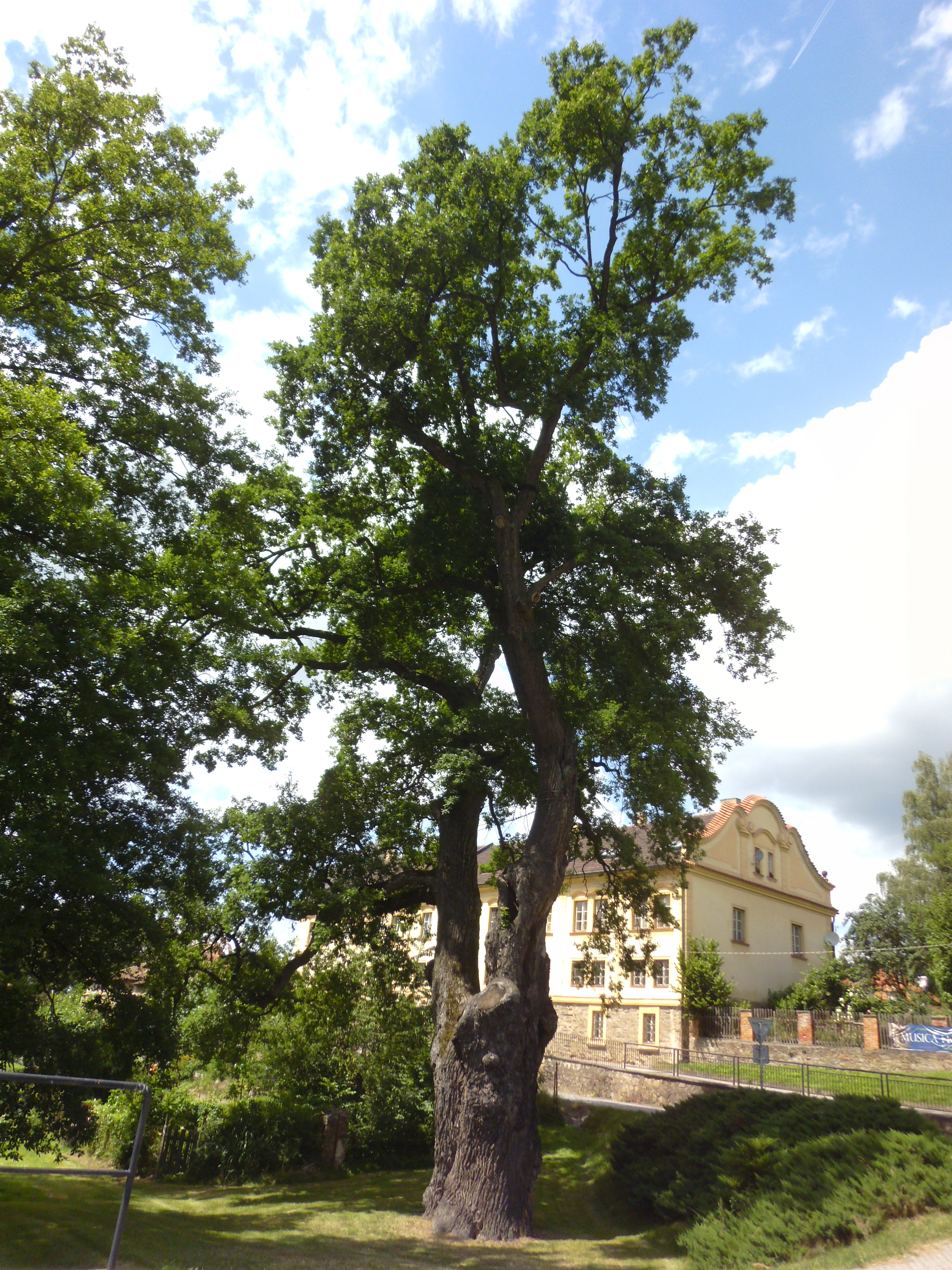 Žižkův dub (Želiv)